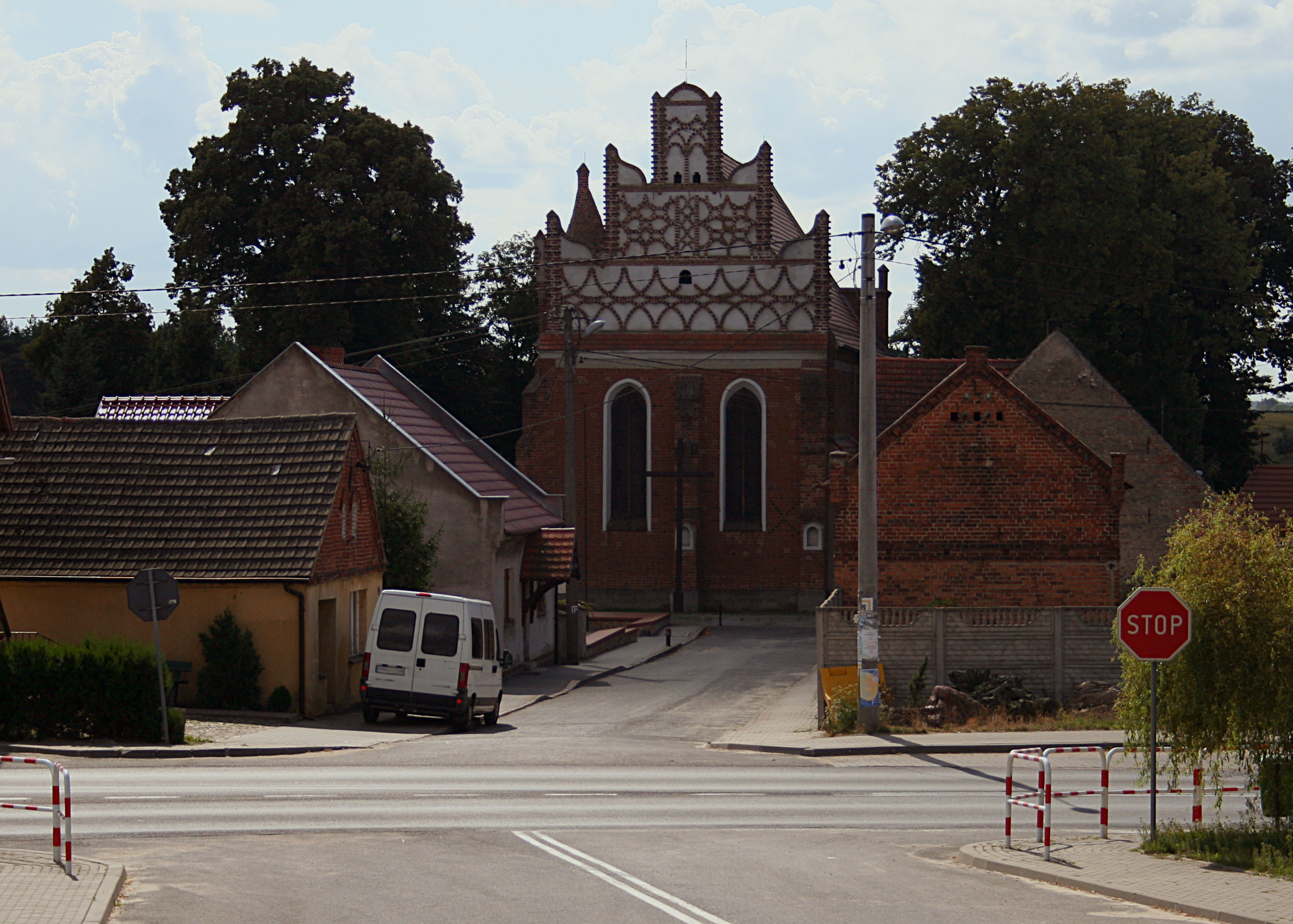 Kamionna, gmina Międzychód